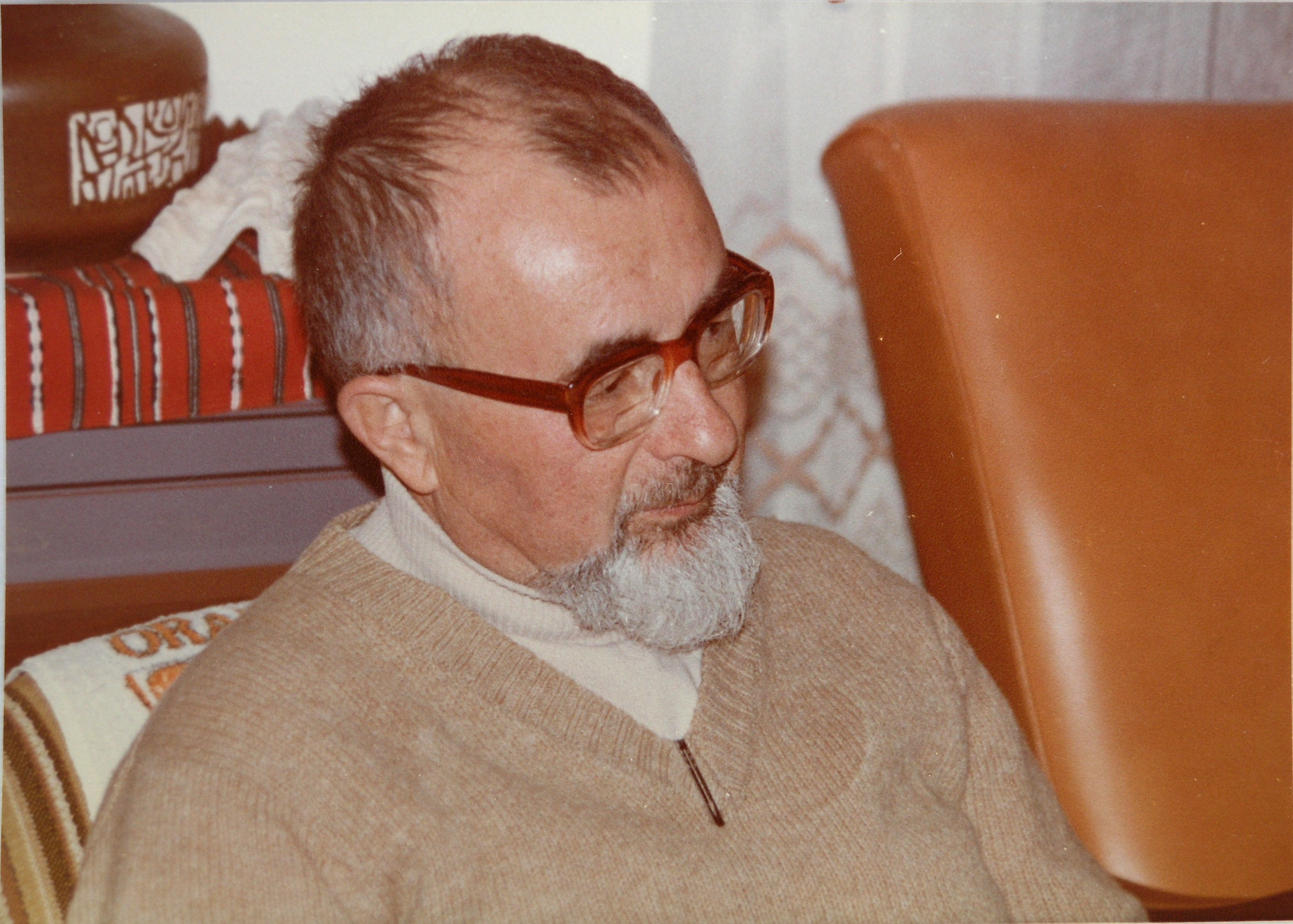 שמואל אוסוואלד רופאייזן ("האח דניאל", 29 בינואר 1922 - 30 ביולי 1998) היה יהודי ניצול שואה שהמיר דתו לנצרות והיה לנזיר. רופאייזן התפרסם לאחר שביקש לעלות לישראל כיהודי על-פי חוק השבות, אך בקשתו נדחתה על ידי רשויות המדינה בגלל התנצרותו, ואף ערעורו לבג"ץ על כך נדחה.